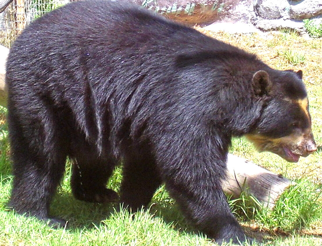 Oso andino en el zoológico de Quito